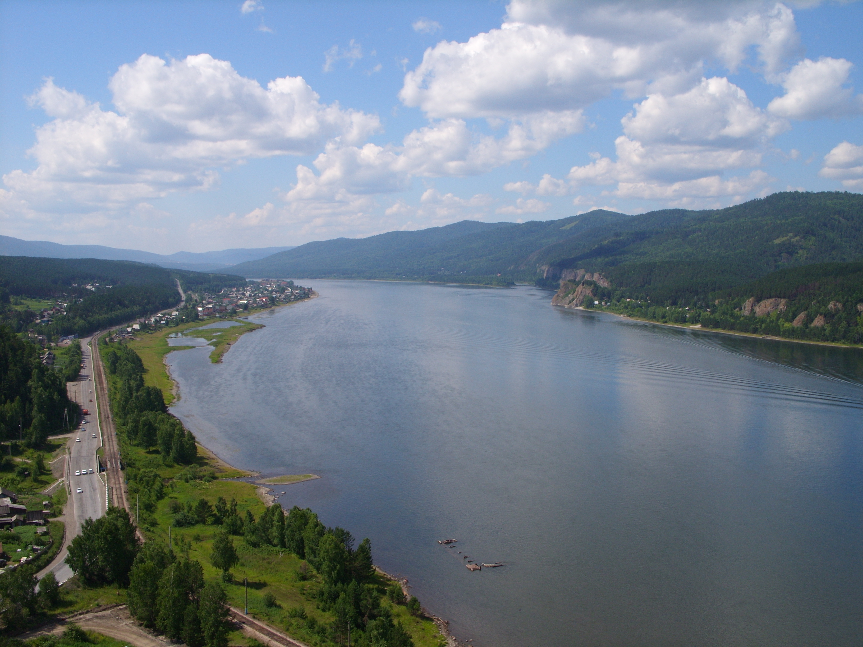 Вид на Енисей вверх по течению со смотровой площадки близ деревни Слизнево, городской округ "Город Дивногорск", Красноярский край, Россия